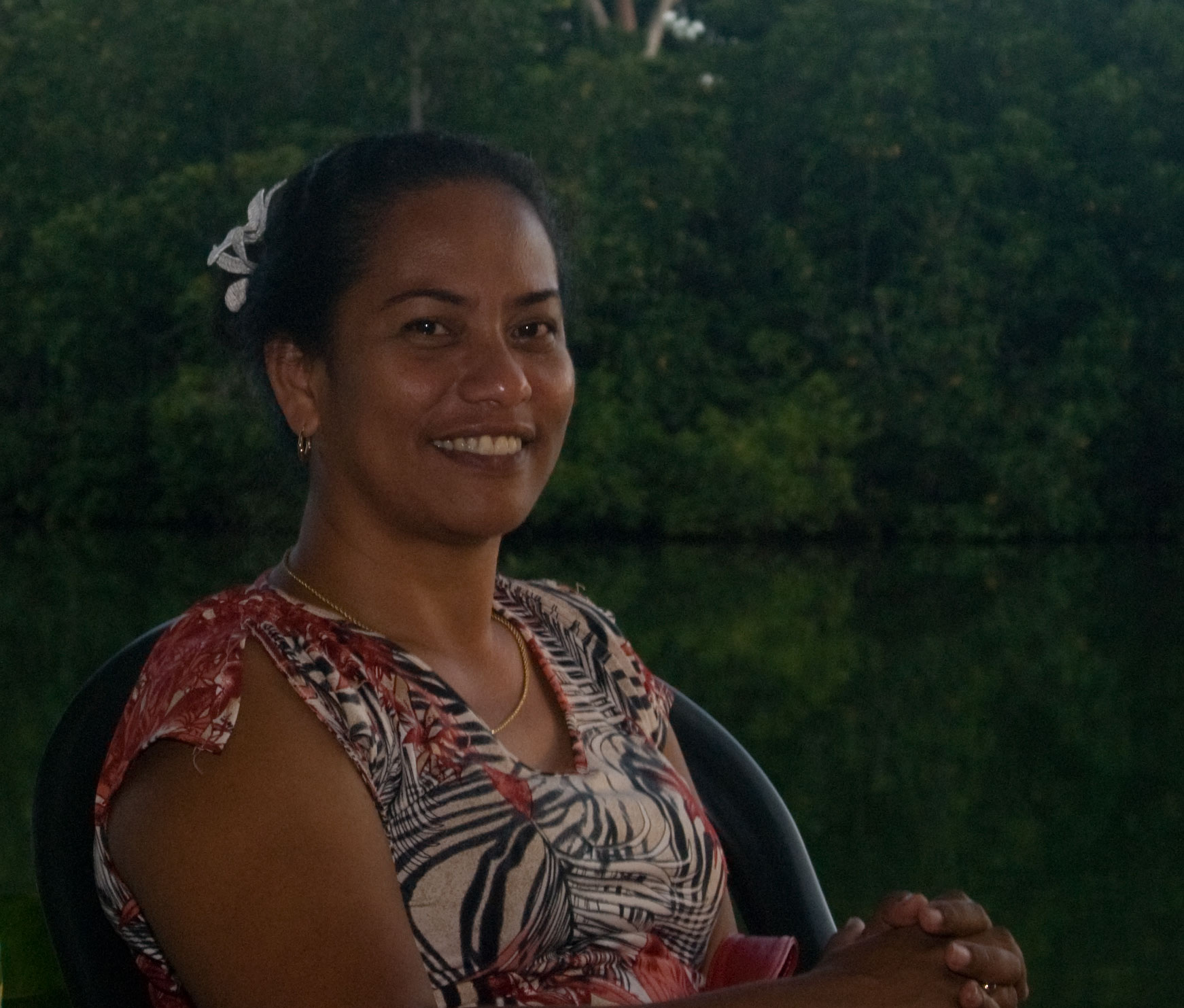 Tuvaluan Woman